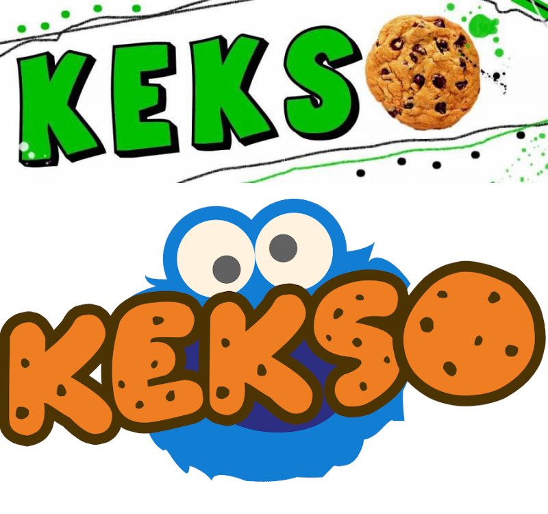 KEKSO (Kreema Esperanto-KurSO) estas renkontiĝo por novaj junaj esperantistoj en germanio